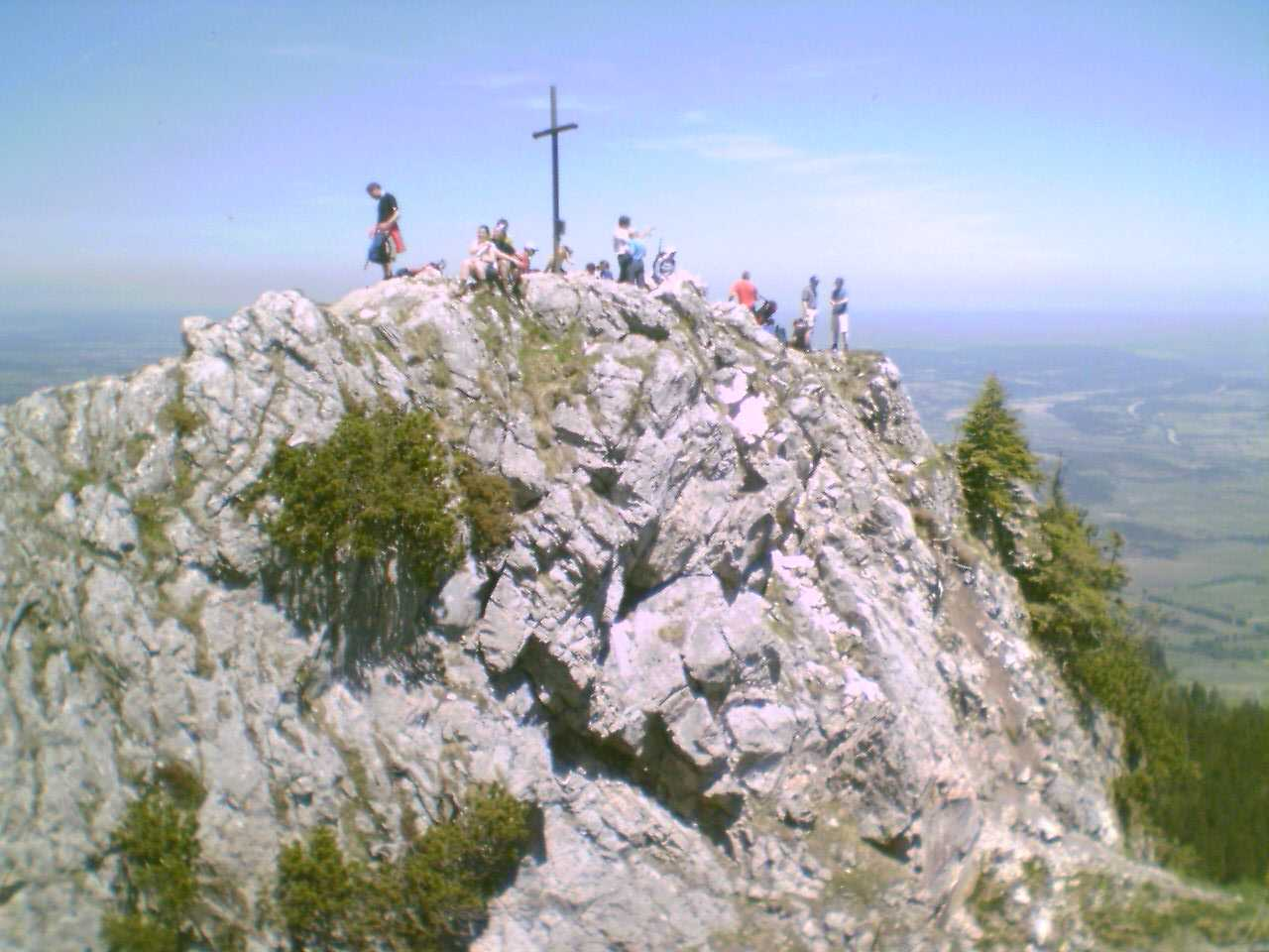 Die höhere Spitze des Ettaler Mandls von der anderen Spitze aus gesehenIm Hintergrund ist das Murnauer Moos zu sehen.